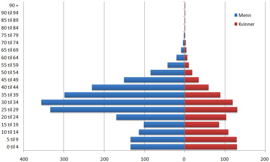 De Forente Arabiske Emiraters befolkningspyramide fra 2000 (per tusen)